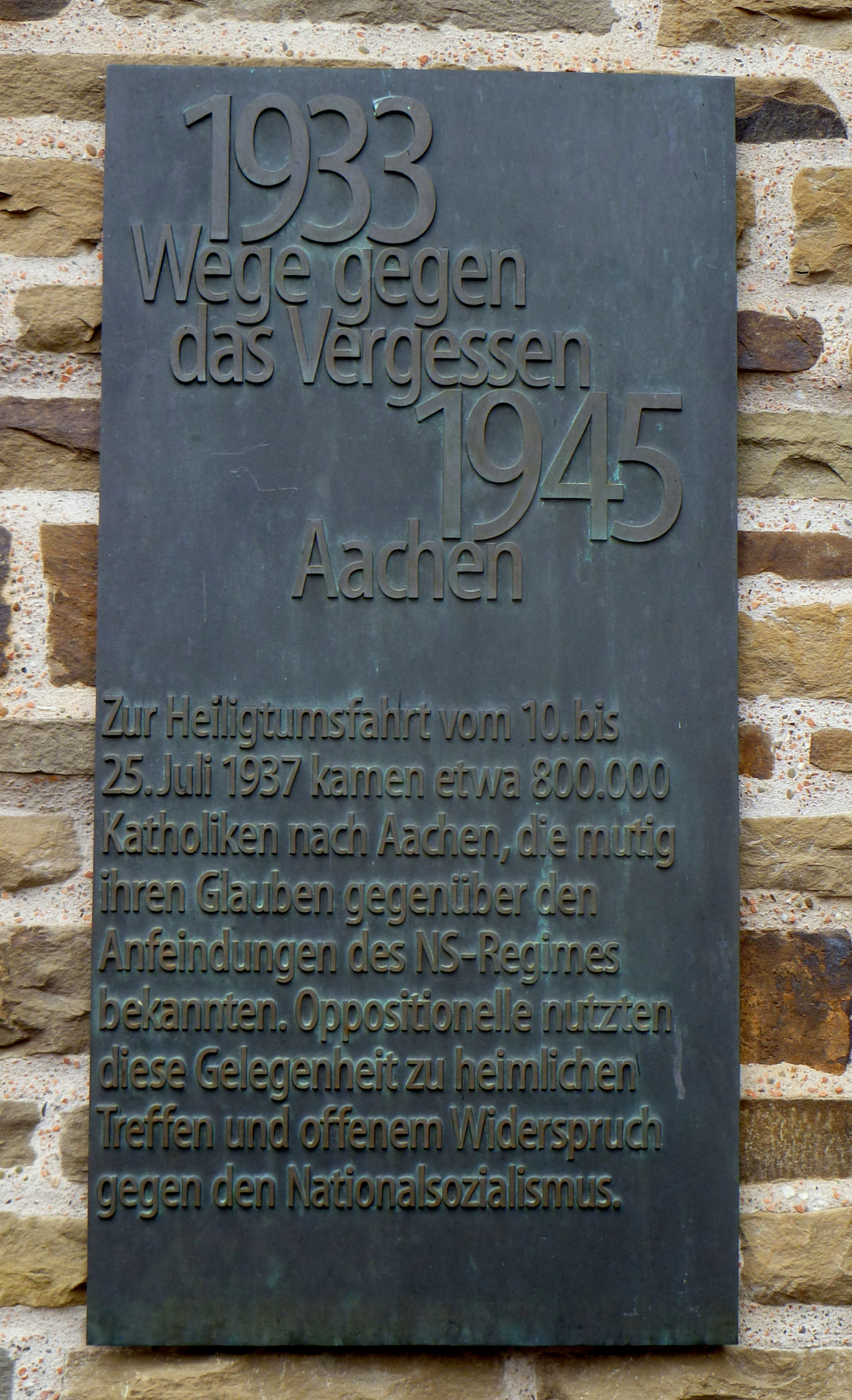 Gedenktafel im Rahmen "Wege gegen das Vergessen" an der Domsingschule, Katschhof Aachen